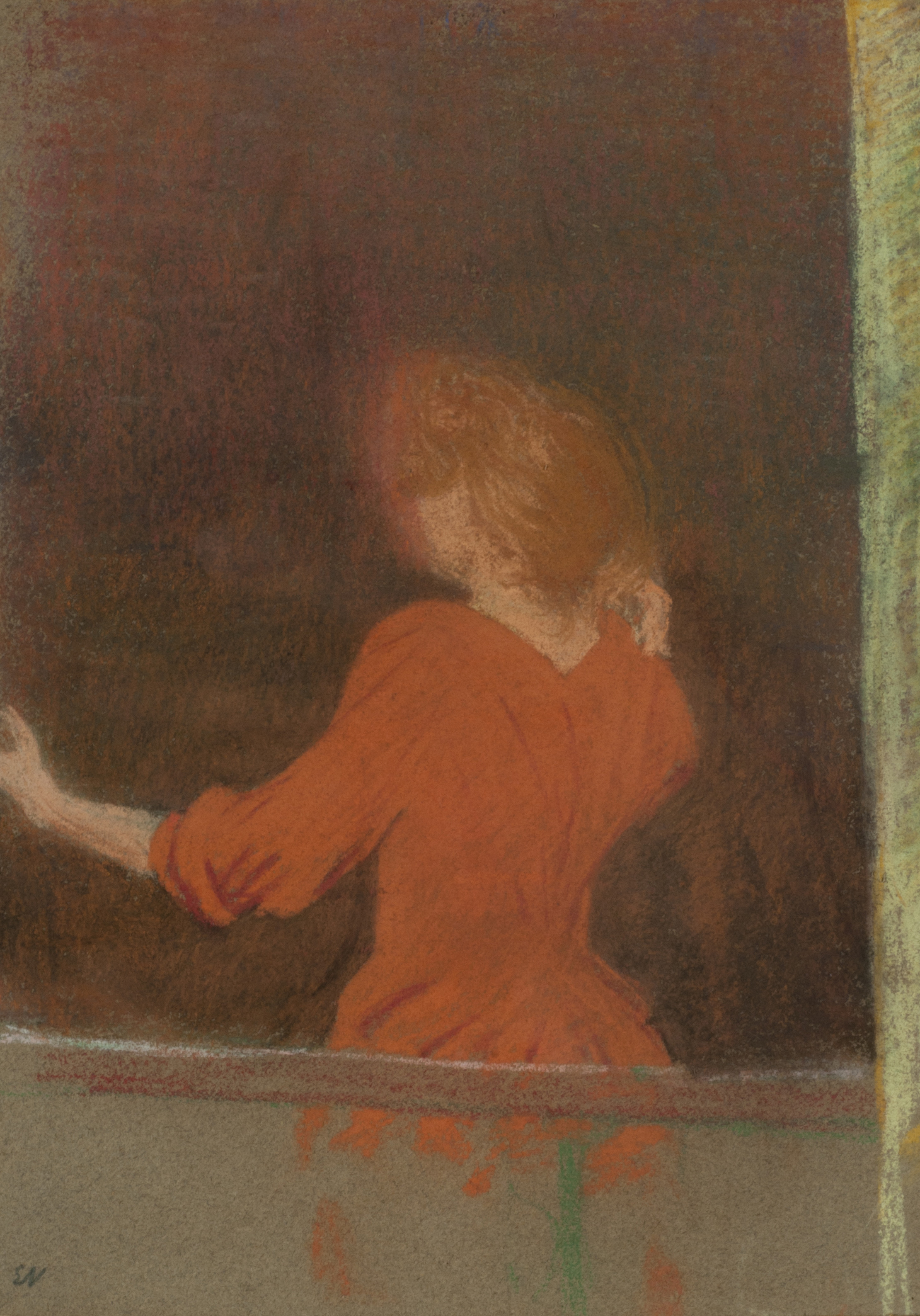 Édouard Vuillard, Femme en rouge, dos à la fenêtre (Mujer de rojo, de espaldas a la ventana). Ca. 1890-1891. 34 x 24,5 cm, pastel sobre cartón. Inv. 8574.